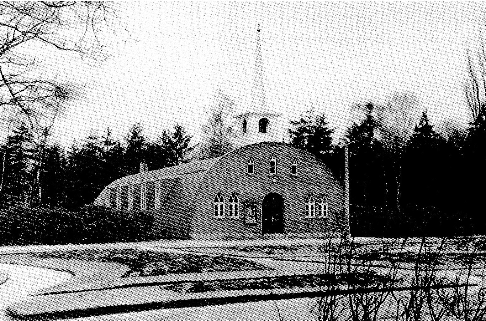 1949 errichtete Behelfskirche der Amerikanischen Streitkräfte am Haupteingang zum Bürgerpark in Bremerhaven-Geestemünde, Klinkerfassade und Bogendach aus Wellblech. Das Gebäude wurde 1957 abgetragen und für die katholische Kirchengemeinde St. Ansgar am Mecklenburger Weg in Leherheide wieder errichtet.